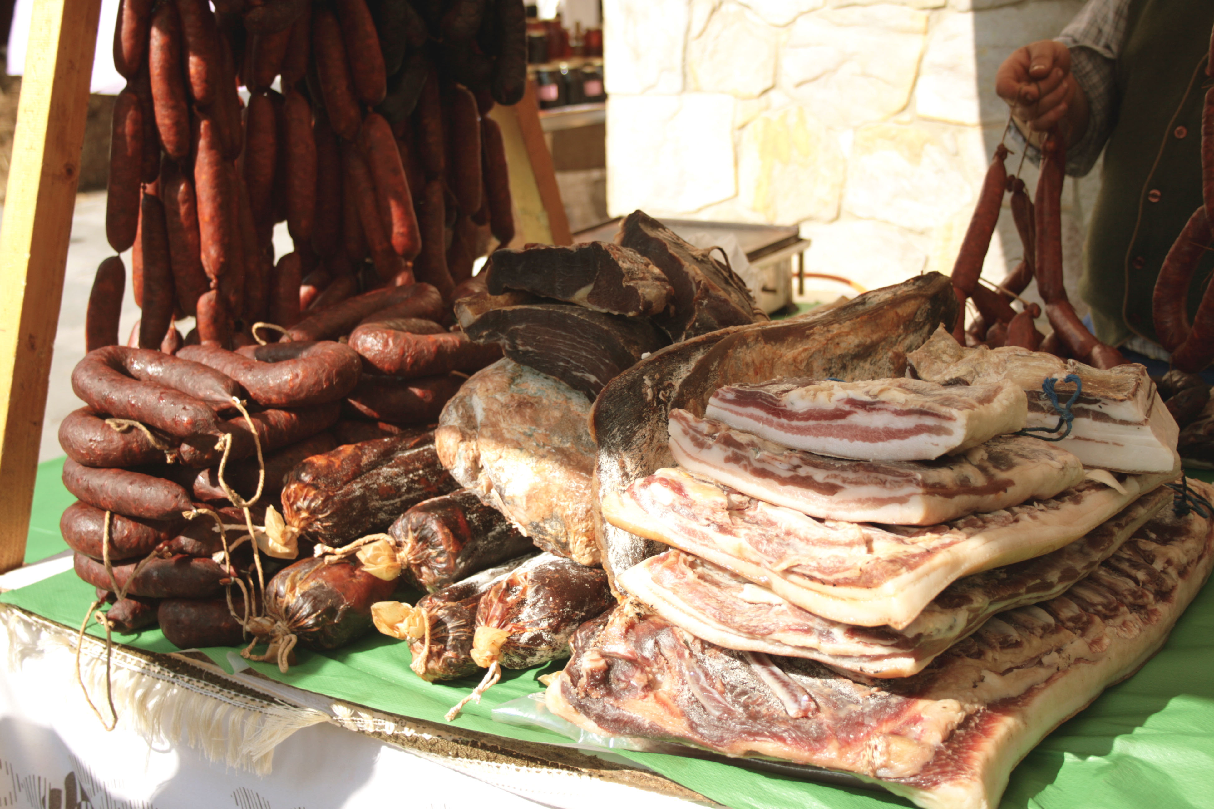 Compango (Asturiana) Pola de Lena